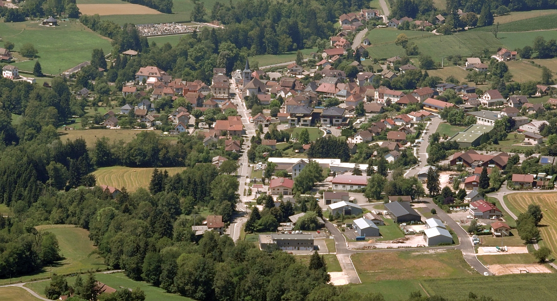 Novalaise (Savoie): vue panoramique